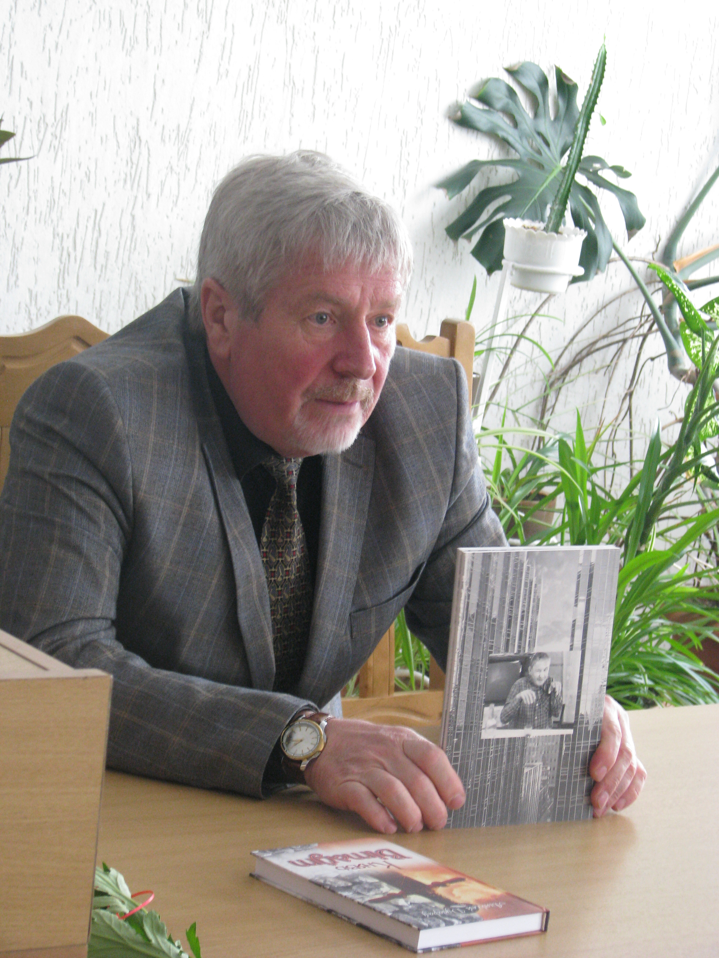 Беларуская (тарашкевіца): Аляксей Дудараў на мерапрыемстве Дзяржаўнага музэя гісторыі беларускай літаратуры. 23.06.2015